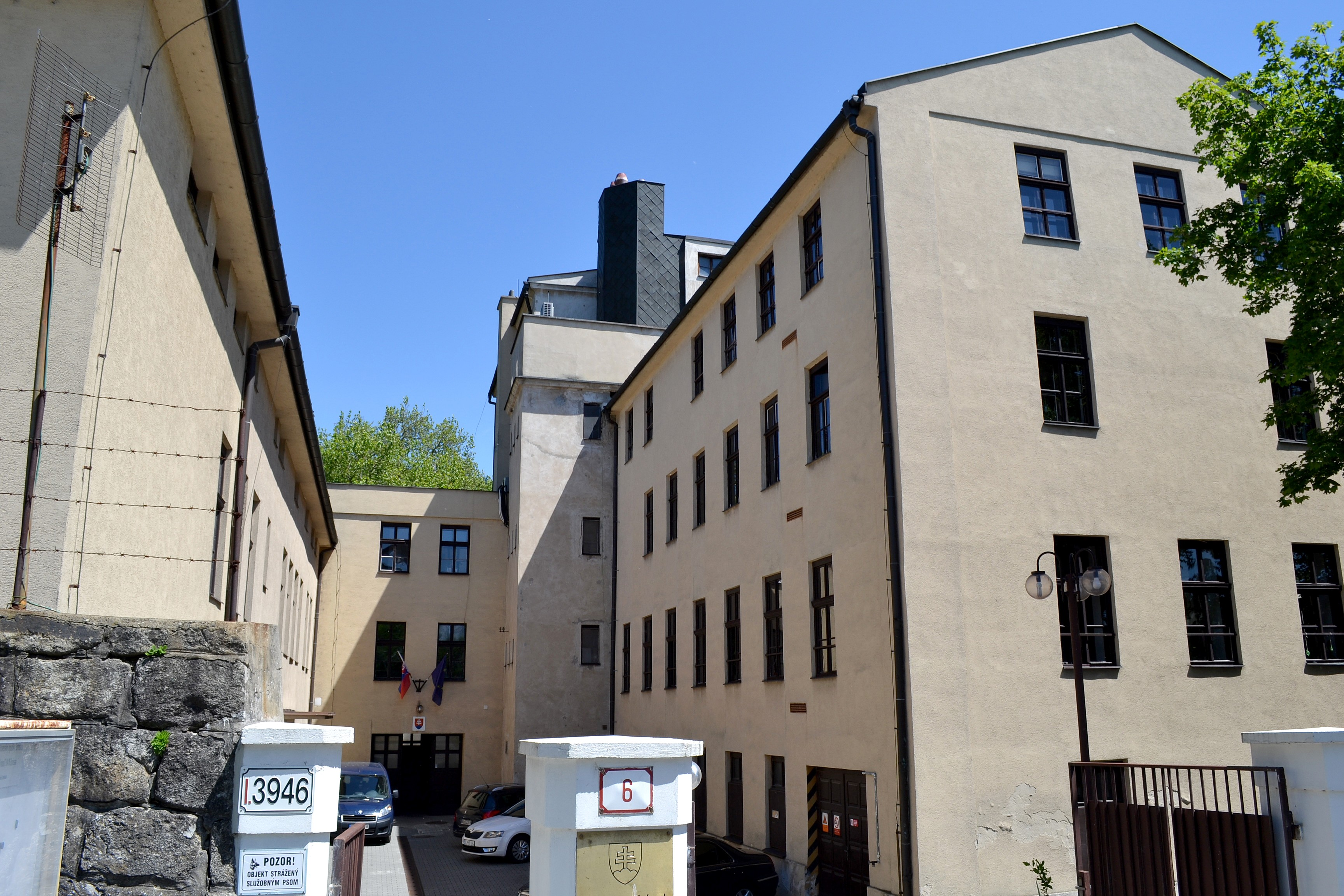 Niekdajší VII. mlyn v Mlynskej doline, v roku 1868 prestavaný na Kűhmayerovu továreň. Dnes tu sídli Pamiatkový úrad Slovenskej republiky